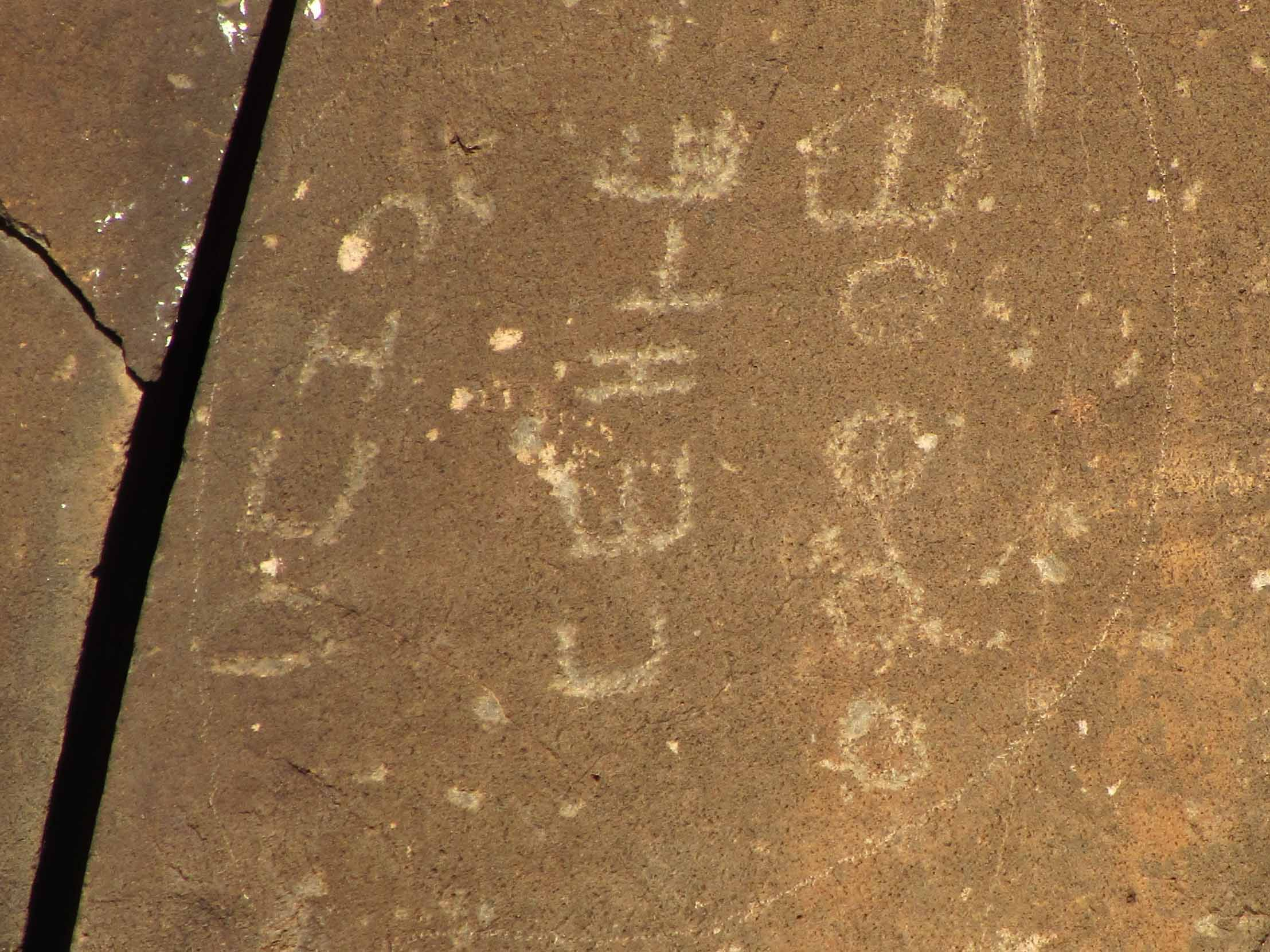 Grabados rupestres del barranco de Balos, Agüimes, Gran Canaria, encuadre